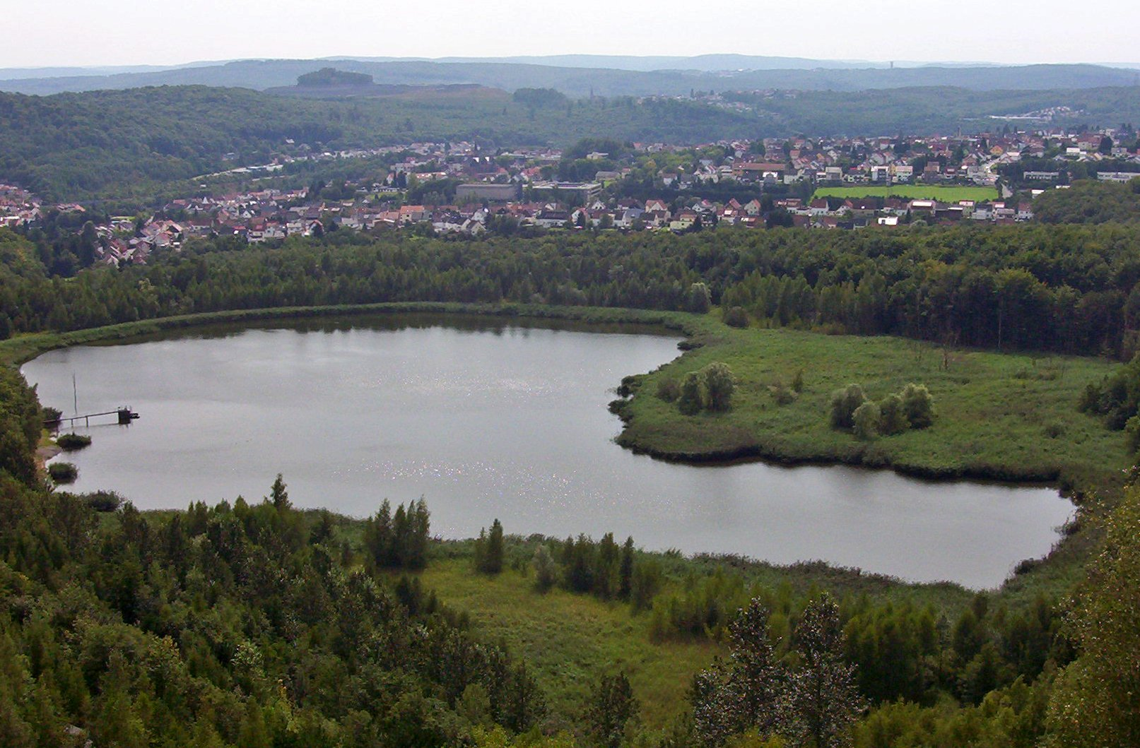 Kohlbachtalweiher Goettelborn (2007).